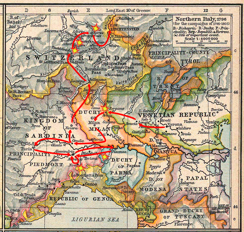 Mappa della campagna di Suvorov in Italia e Svizzera nel 1799.